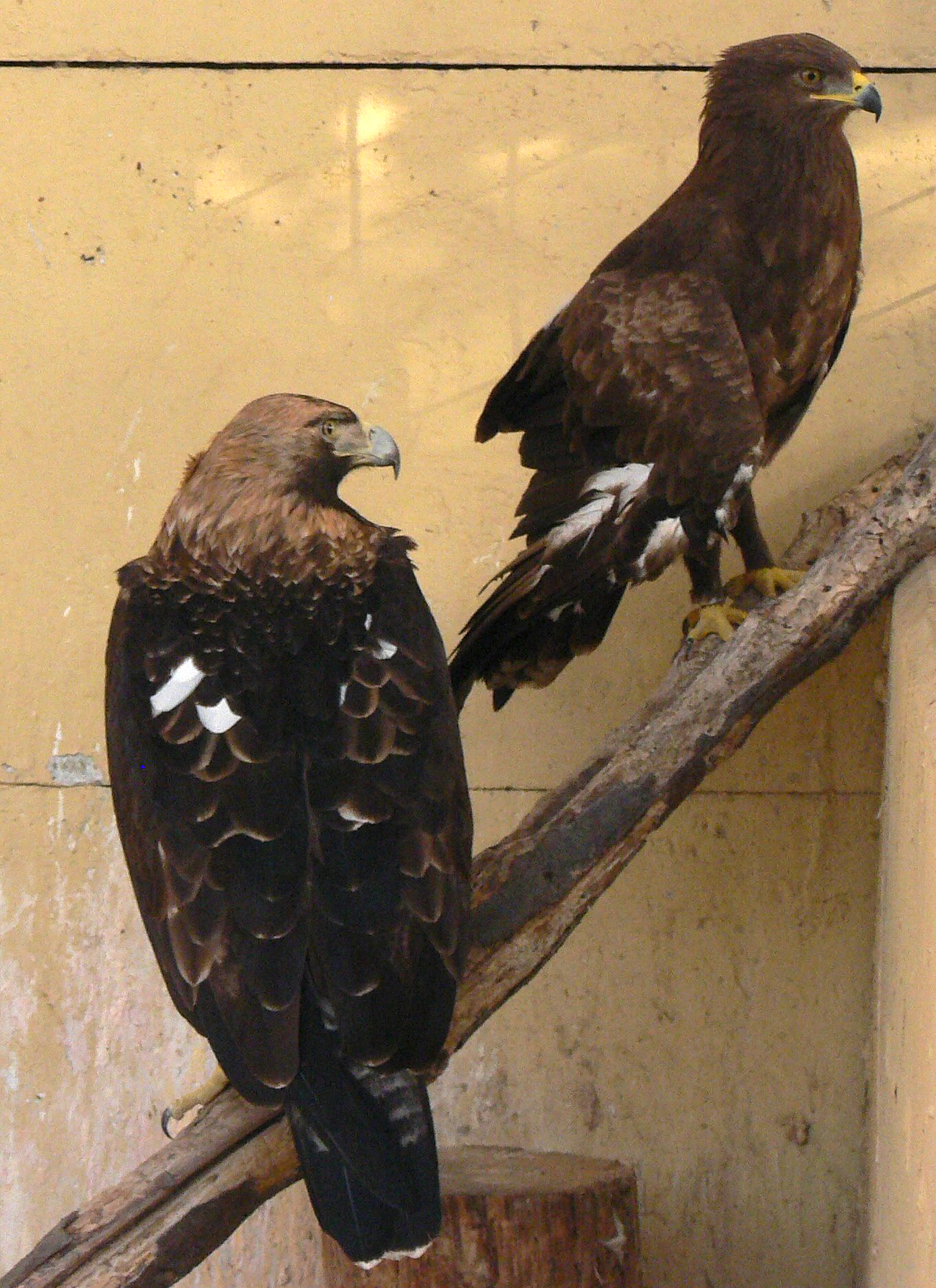 צולם בגן הזואולוגי בת"א Taken in Tel Aviv Zoological Gardens Aquila heliaca and Aquila pomarina.